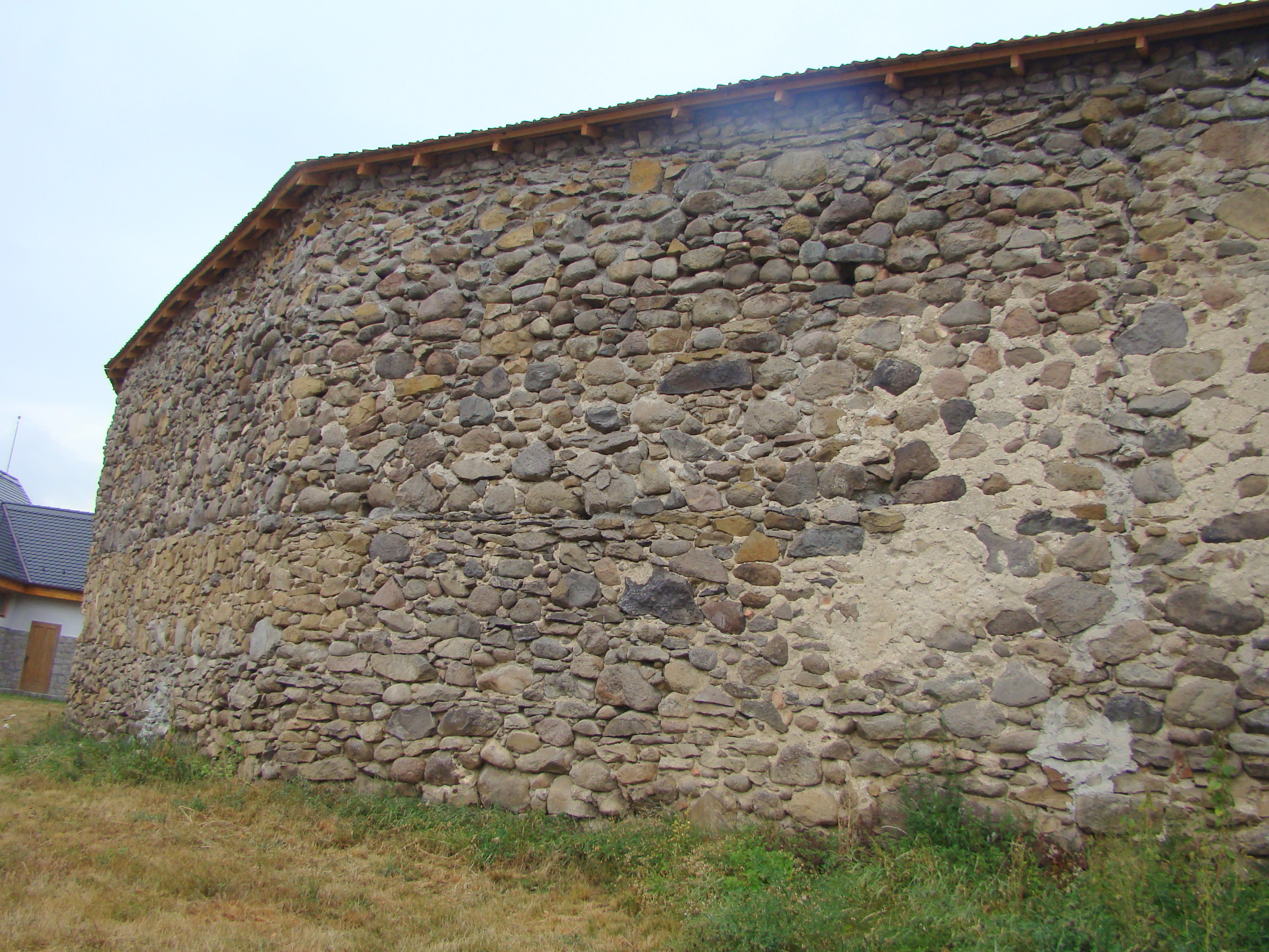 Biserica reformată sat Ghidfalău; comuna Ghidfalău 204 A sec. XIII - XVII, transf. 1787